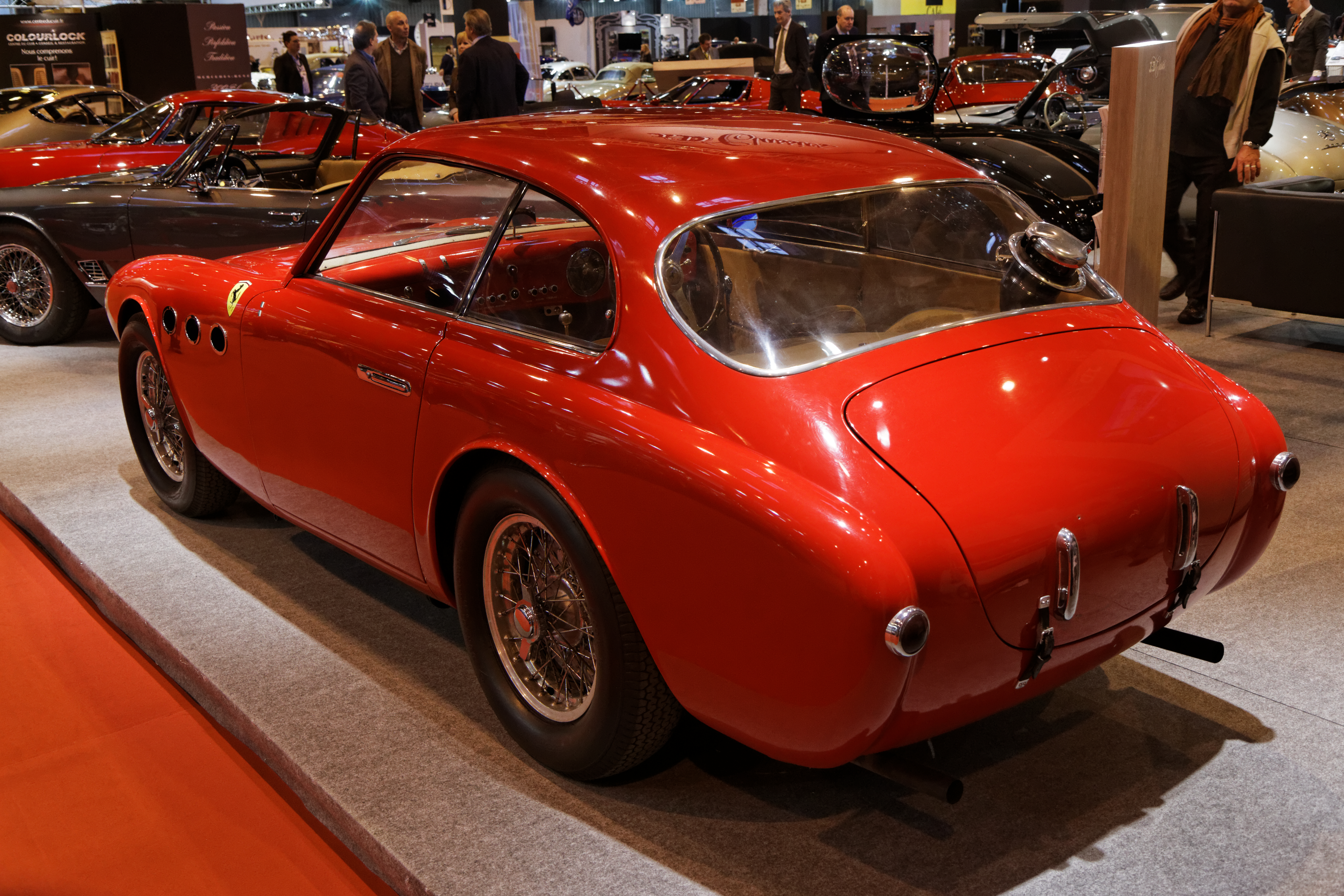 Une Ferrari 225 S Berlinetta exposée lors du salon Retromobile 2014.